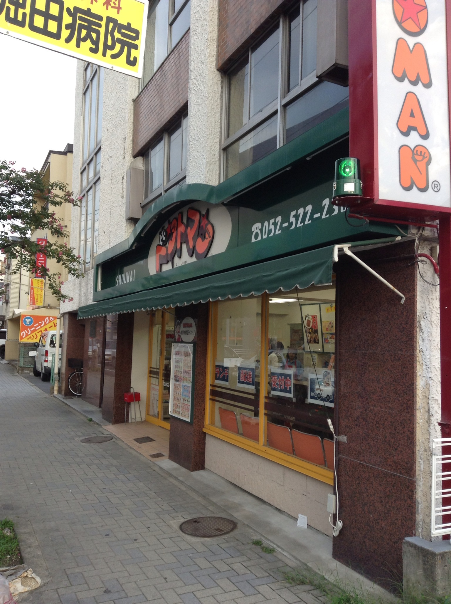 名古屋市西区香呑町のベントマン庄内店を北側公道西側より撮影